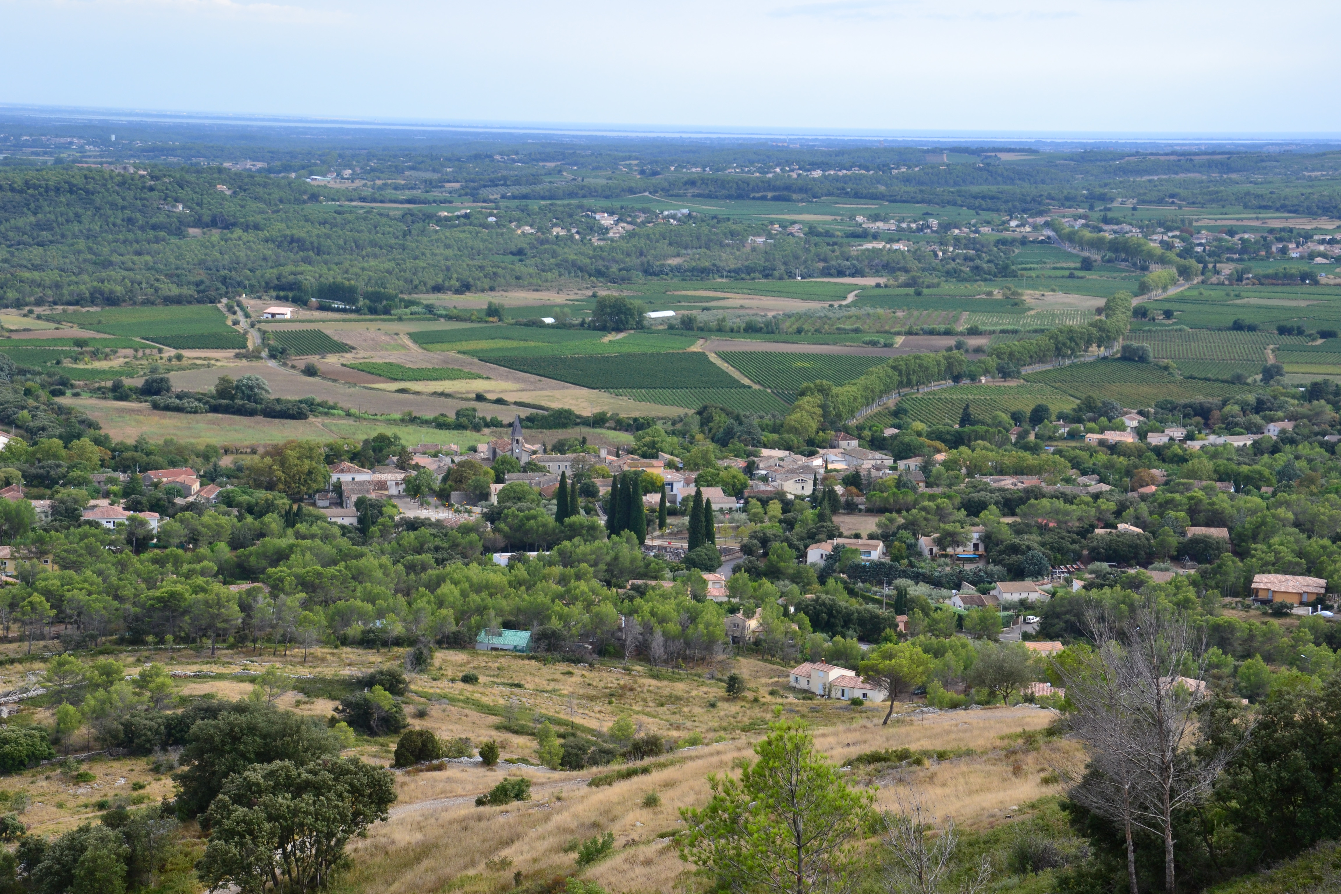 Vue sur Saint-Bauzille-de-Montmel depuis le Puech des Mourgues.